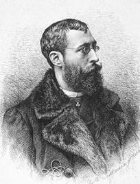 Parlamentario, Secretario del Congreso de los Diputados y Director de la Administración Civil